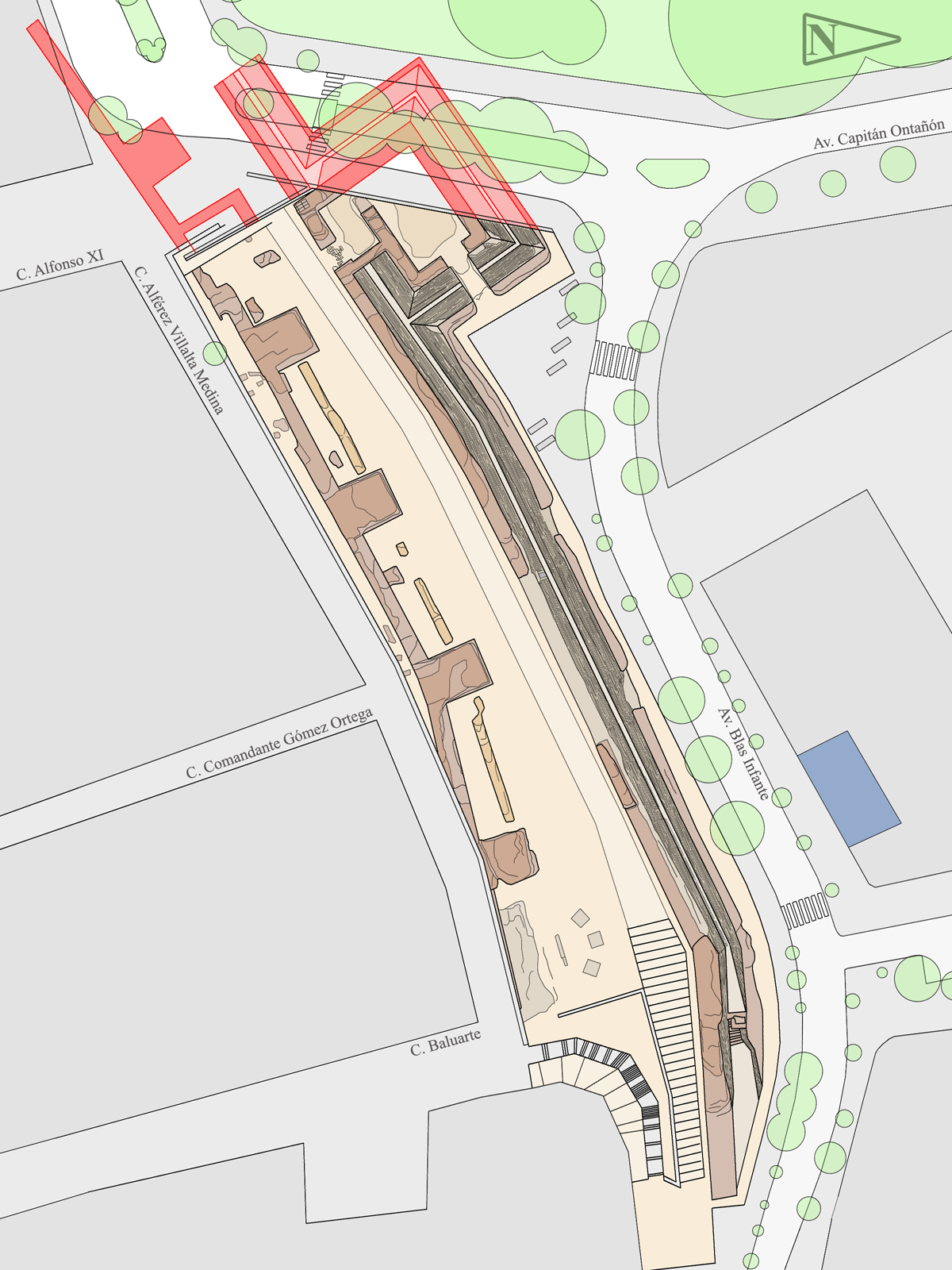 Plano del parque arqueológico de las murallas meriníes de Algeciras (Andalucía, España)